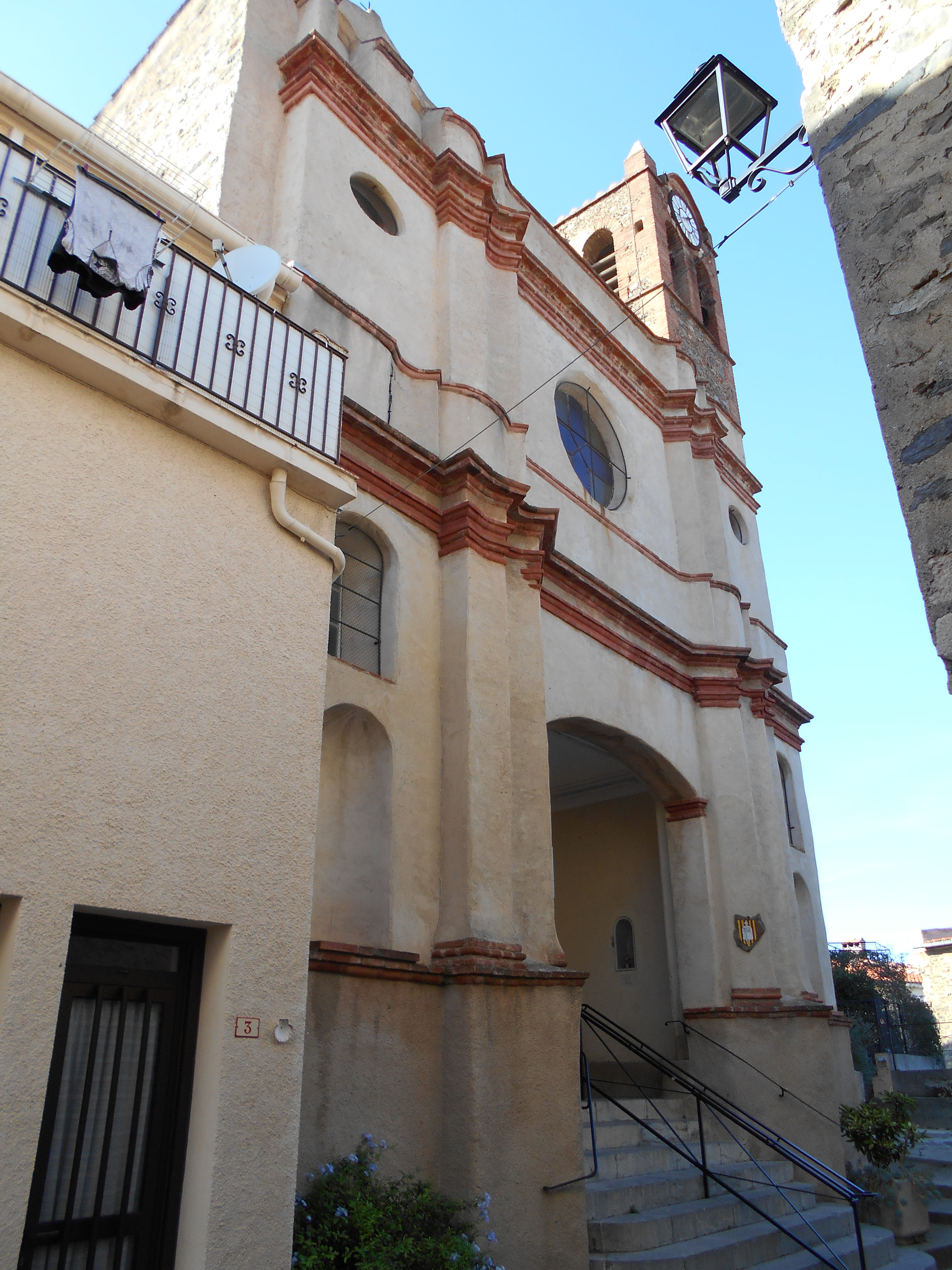 Sanr Joan i Santa Eugènia de Montner